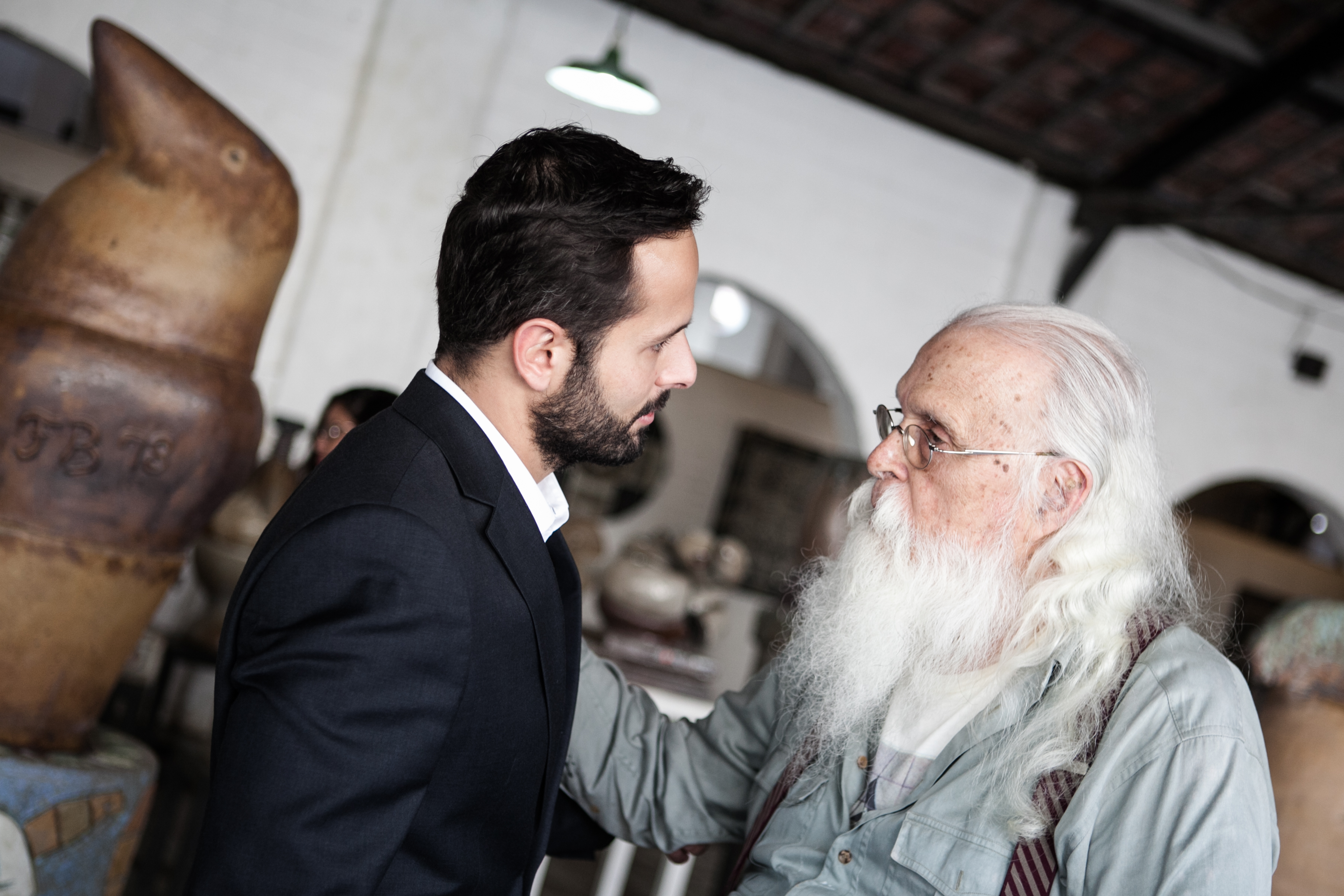 17-06-2016 Ministro da Cultura, Marcelo Calero, visita a Oficina Brennand acompanhado pelo artista Francisco Brennand, em Recife. Fotos: Janine Moraes/MinC